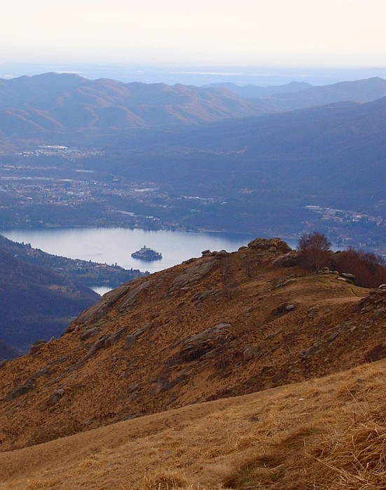 Zicht op Lago d'Orta vanaf de top van de Mottarone